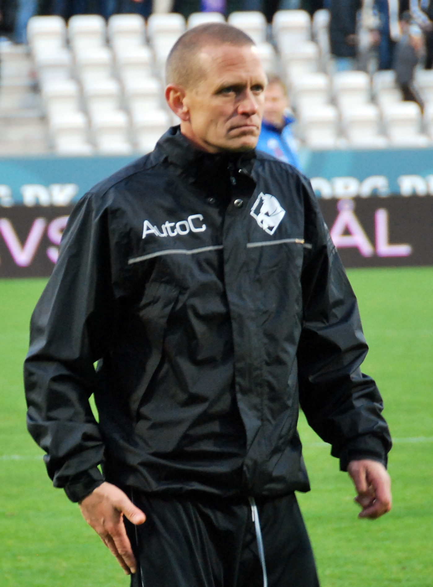 Assistenttræner Joakim Mattson fra Randers FC. Her under en 1. divisionskamp mod Viborg FF på Viborg Stadion.